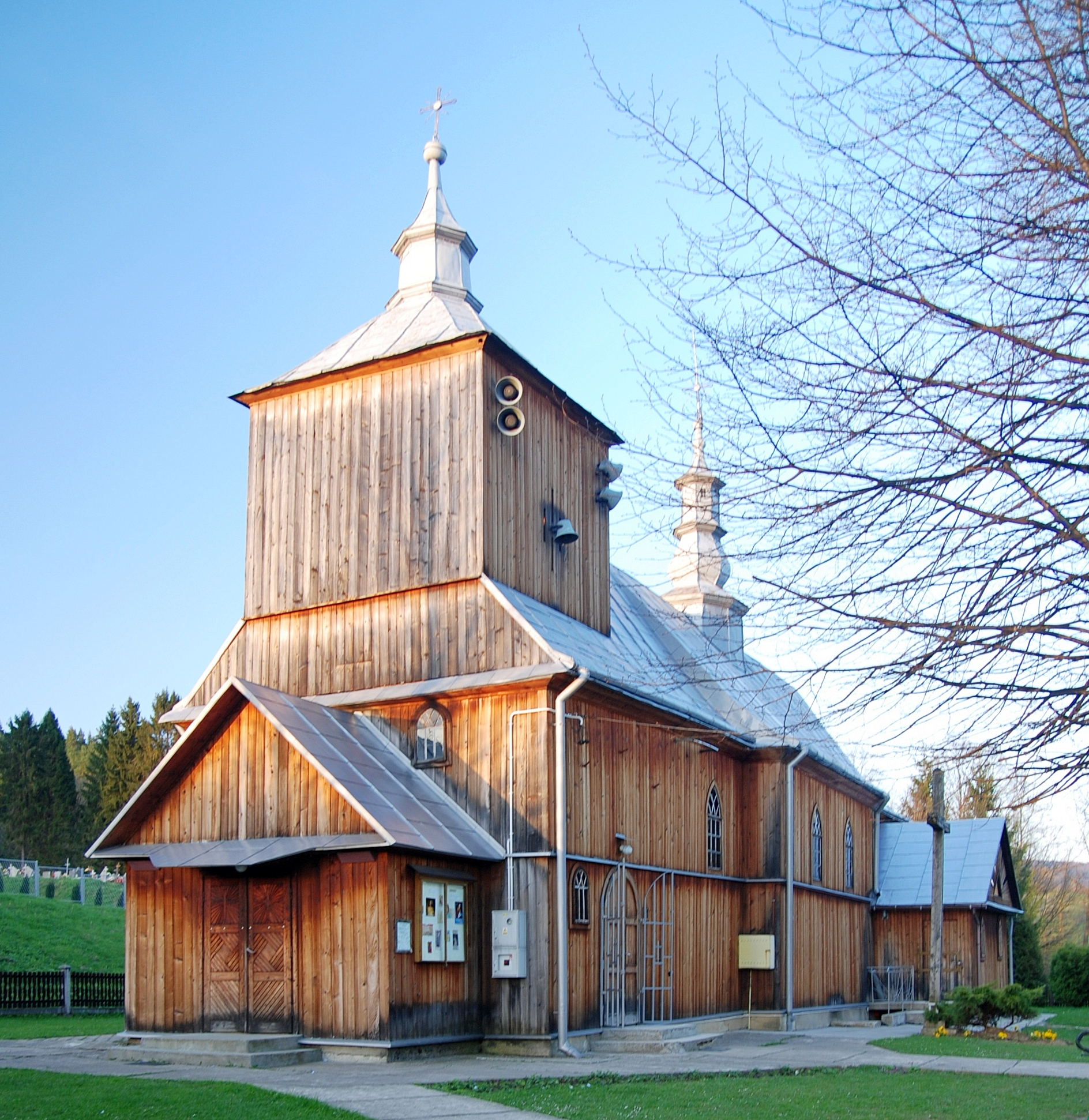 wieś Bezmiechowa Górna